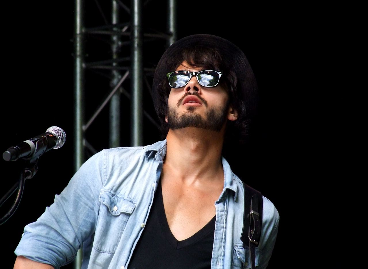 bandlid van Valerius